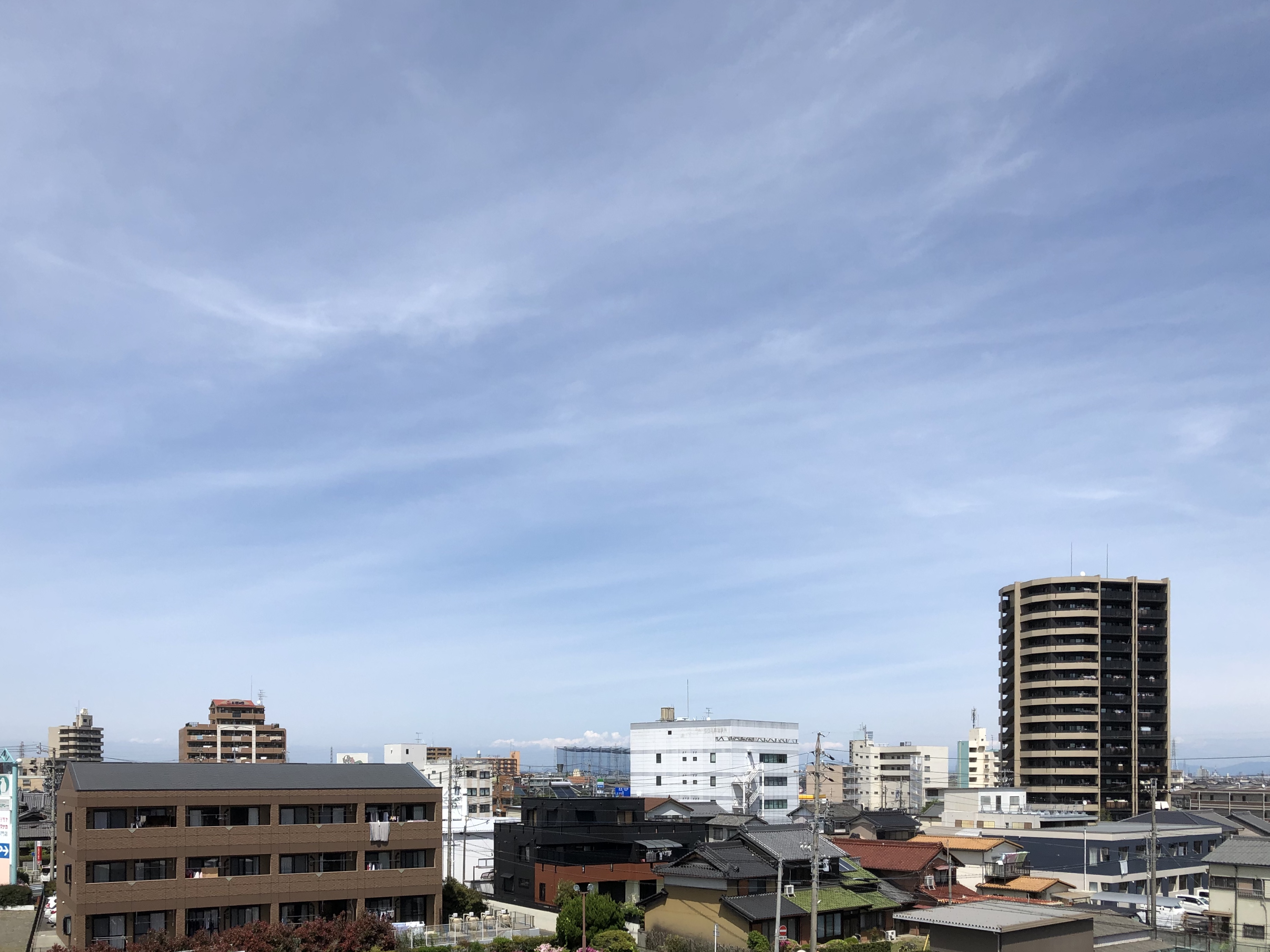 ウイングプラザパディから見た弥富市街